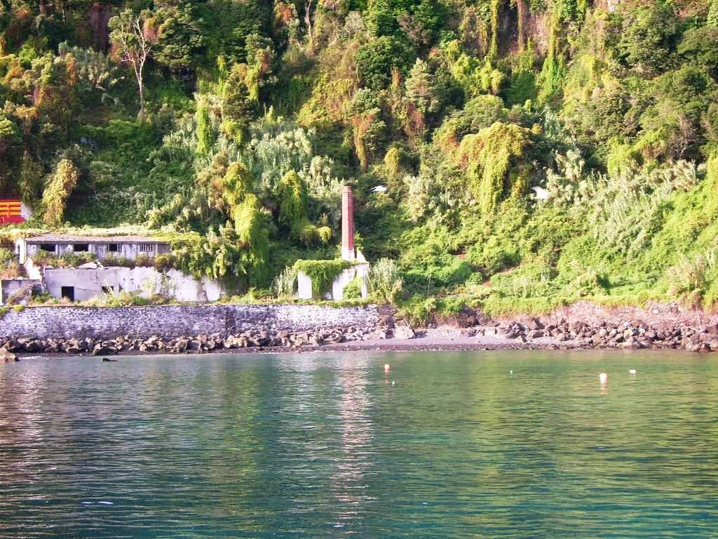 Antiga fabrica de conservas na Baía da Calheta, onde se vai situar o futuro museu da ilha de São Jorge, Açores, Portugal